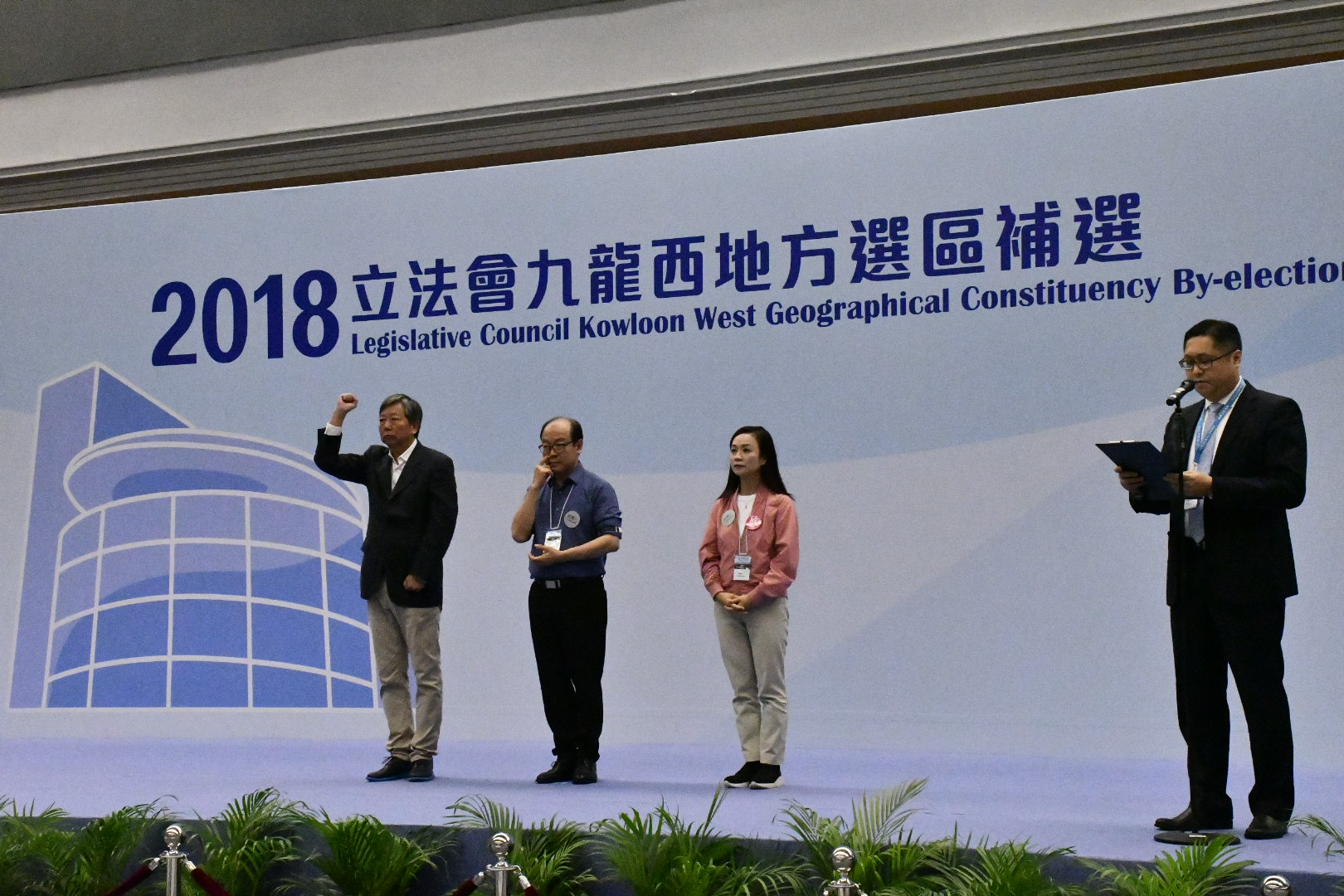 香港立法會九龍西補選民主派未能重奪分組點票否決權。(美國之音湯惠芸攝）